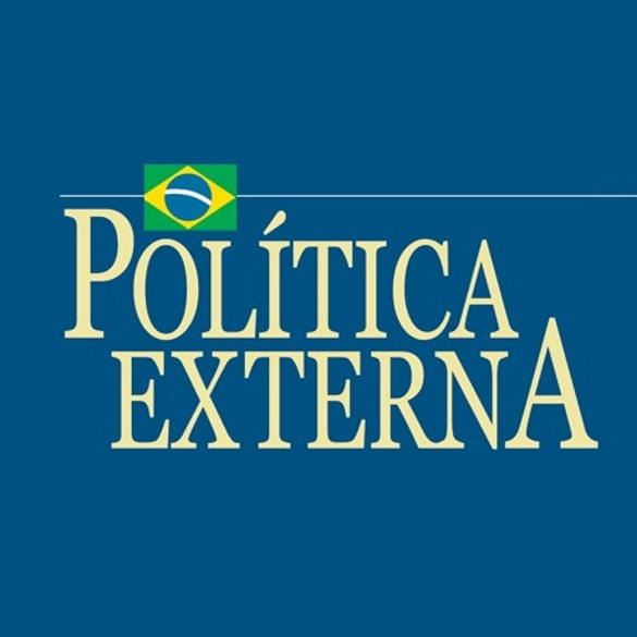 Logo Revista Política Externa